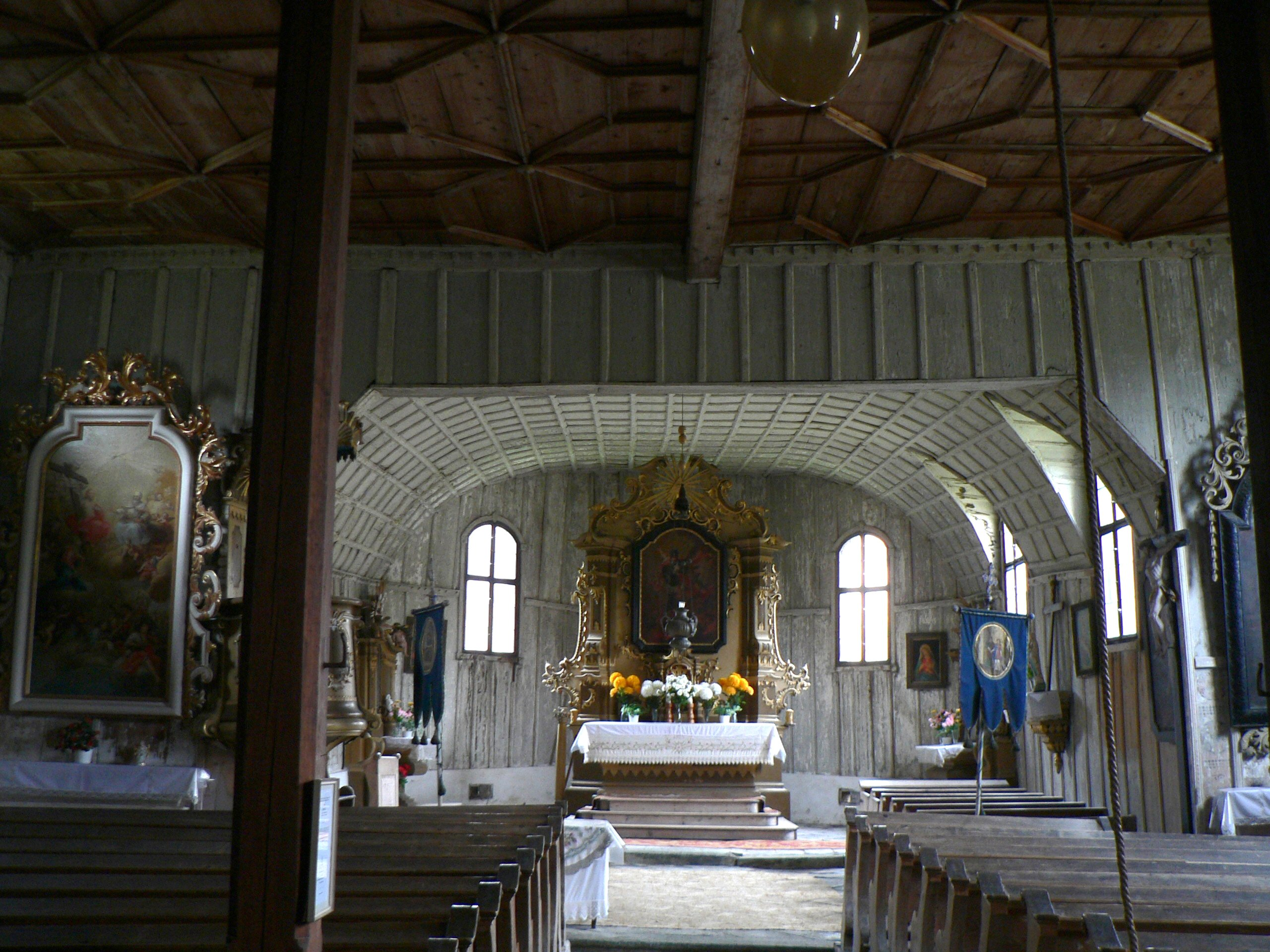 Kostel sv. Michala v Maršíkově, interiér